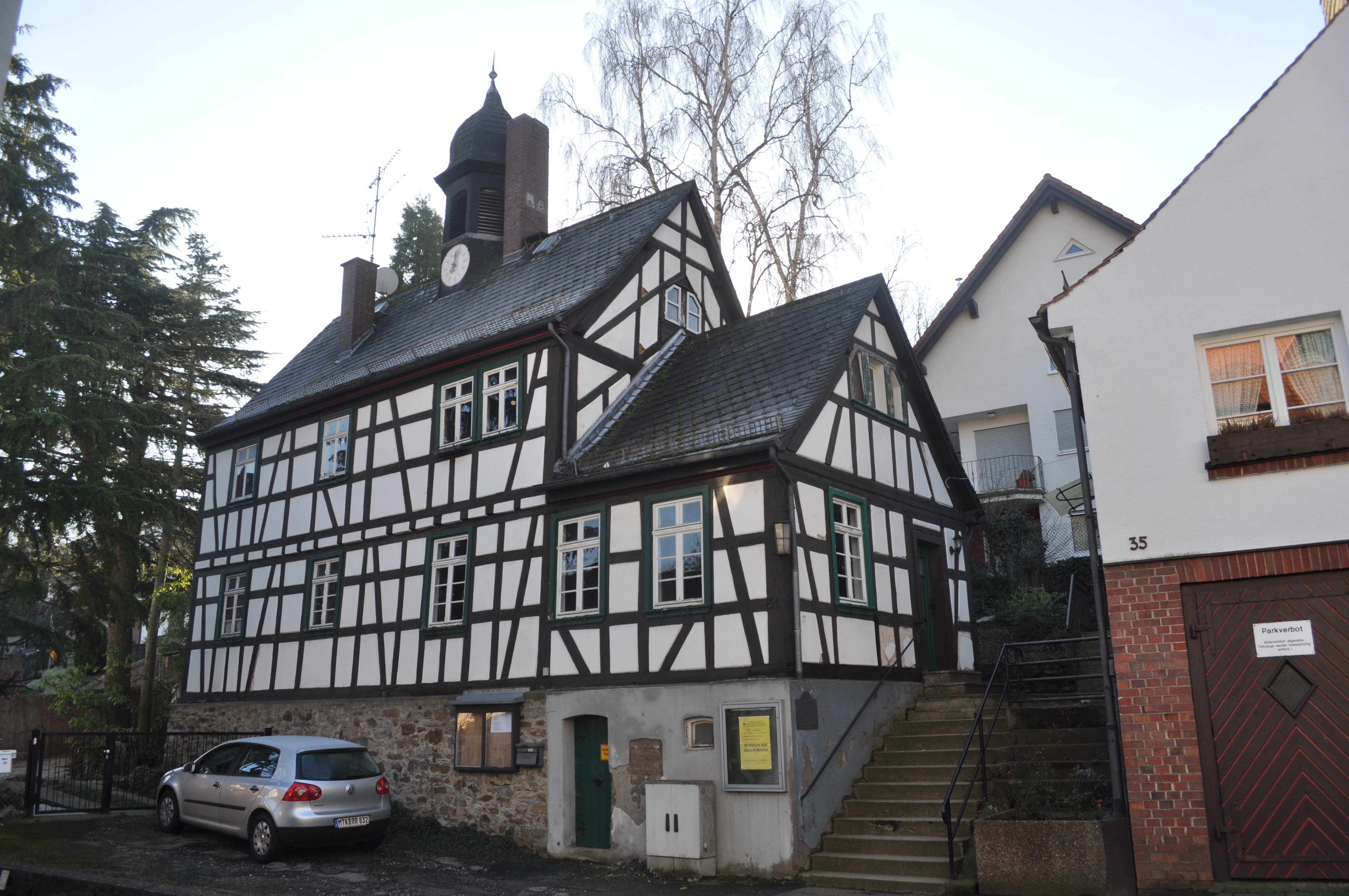 Denkmalgeschütztes Altes Rathaus in Altenhain (Langstraße 31)